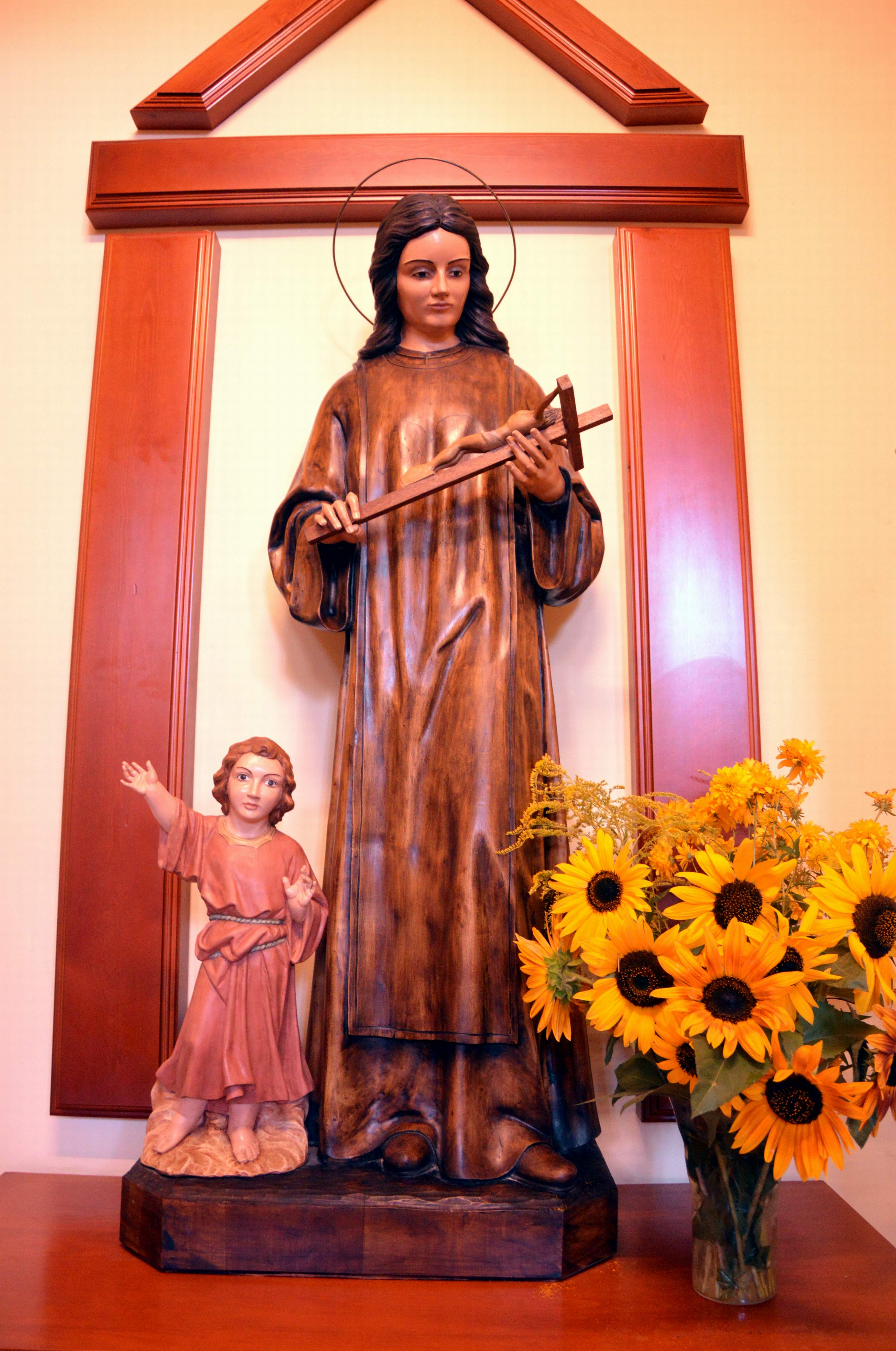 Detalle de la imagen de santa Marina Virgen en la capilla de su nombre en la iglesia parroquial de Torrebaja (Valencia), 2017.